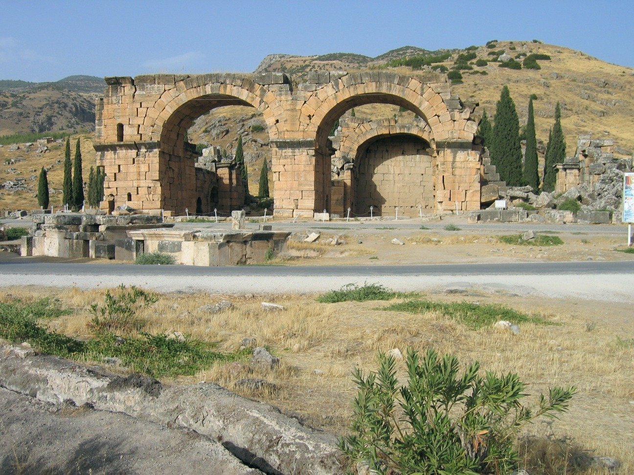 Hierapolis Rote Basilika